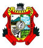 "ESCUDO DE SAN ANDRES TUXTLA"